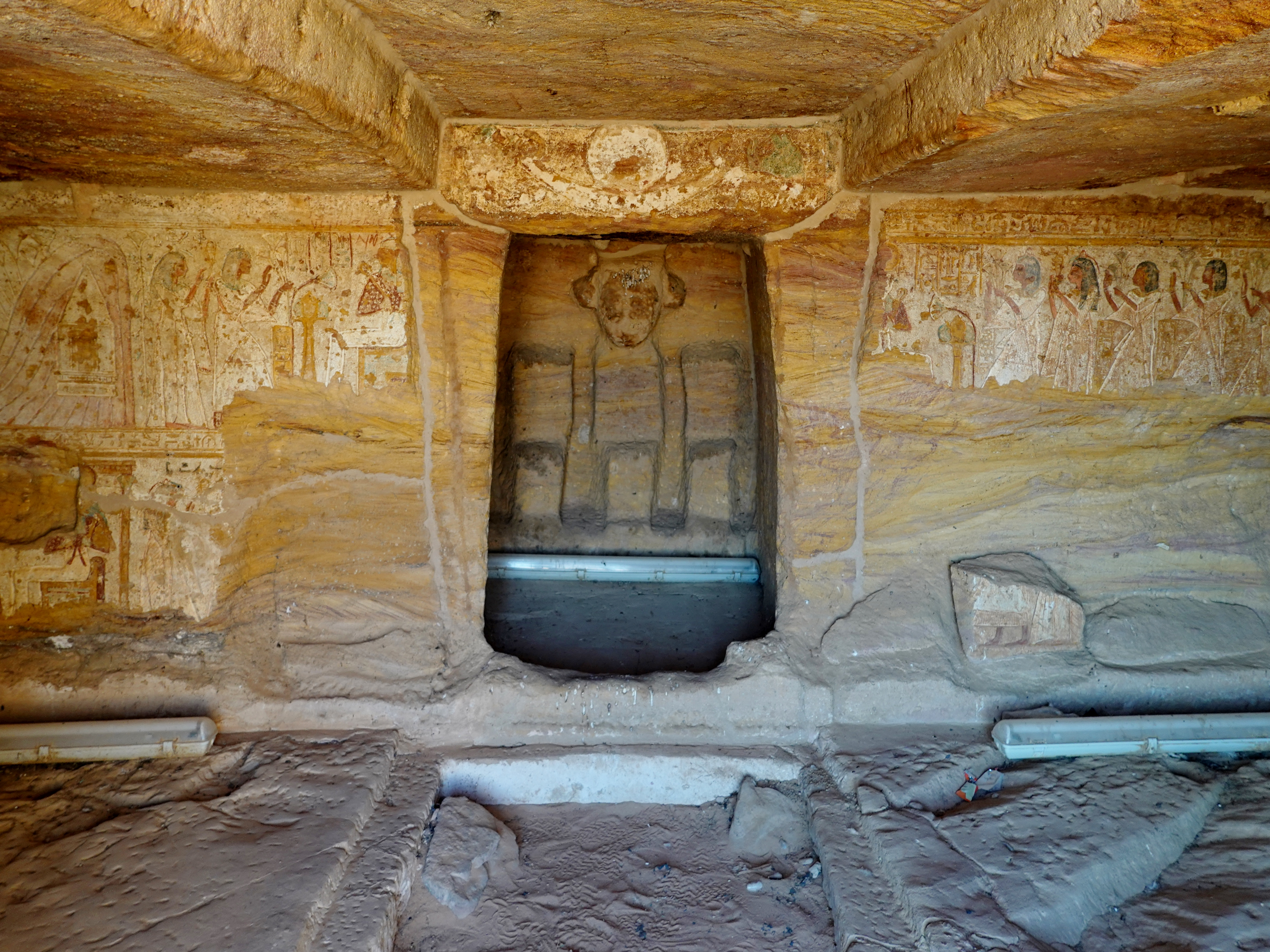 Grab des Pennut am Nassersee, Ägypten